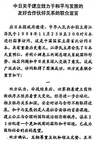 中日关于建立致力于和平与发展的友好合作关系的联合宣言